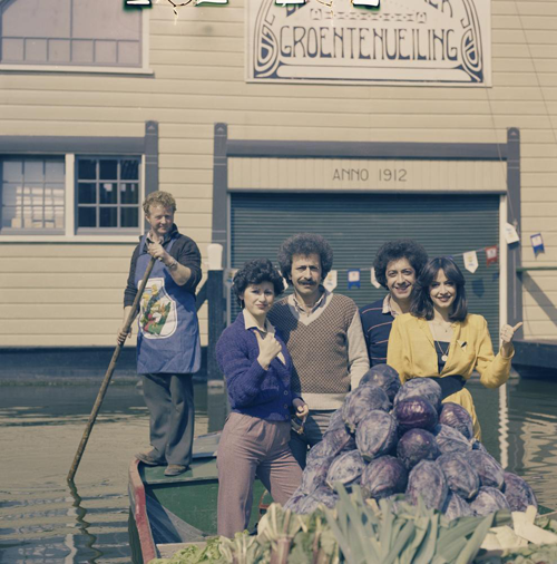 De Griekse zangers Anna Vissi en haar begeleidingsgroep Epikouri tijdens een fotosessie voor het Eurovisie Songfestival 1980